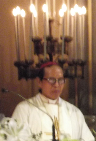 Uskup Keuskupan Malang, Herman Joseph Sahadat Pandoyoputro